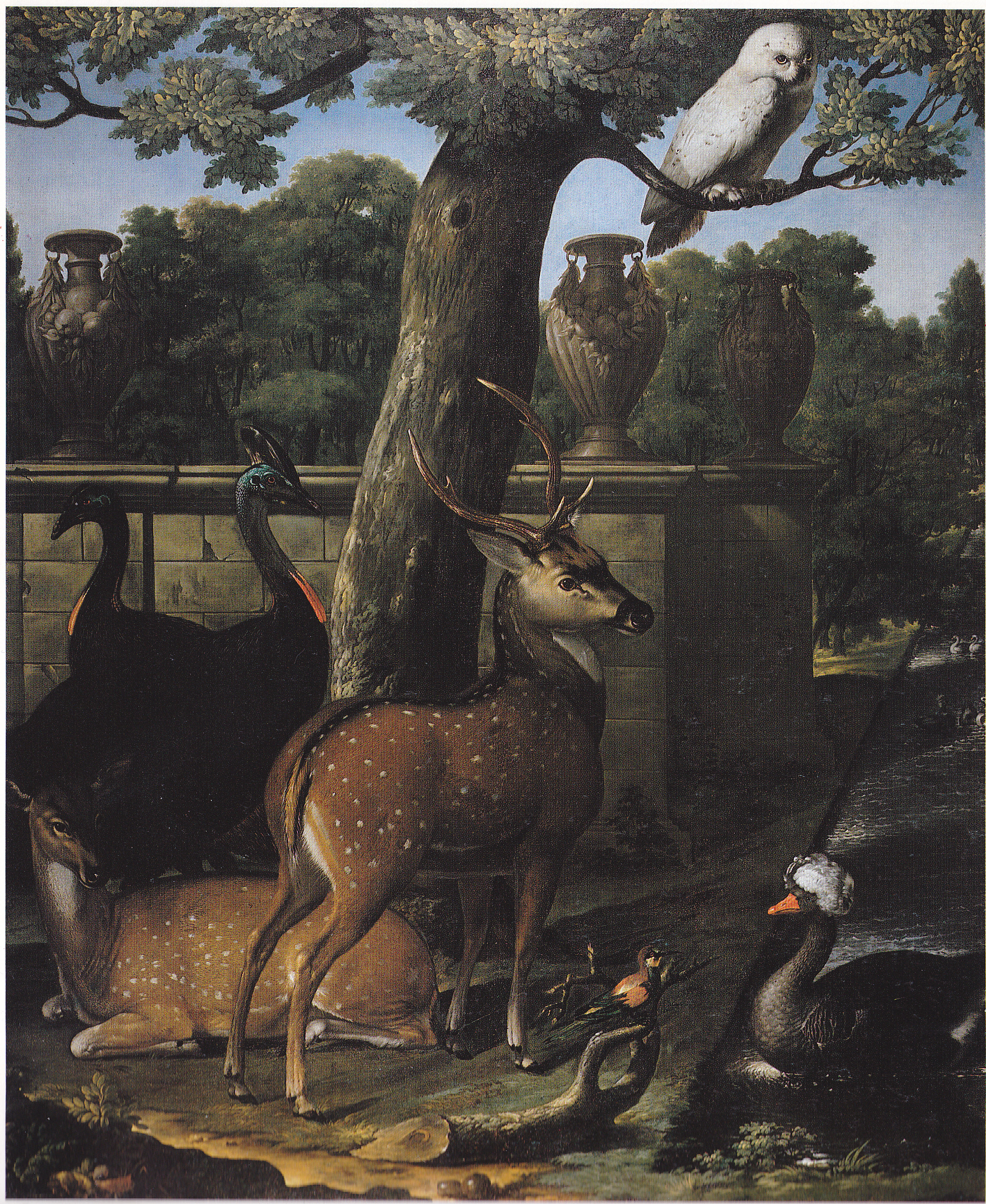 Schneeeule, zwei Kasuare, zwei Axishirsche, Bienenfresser